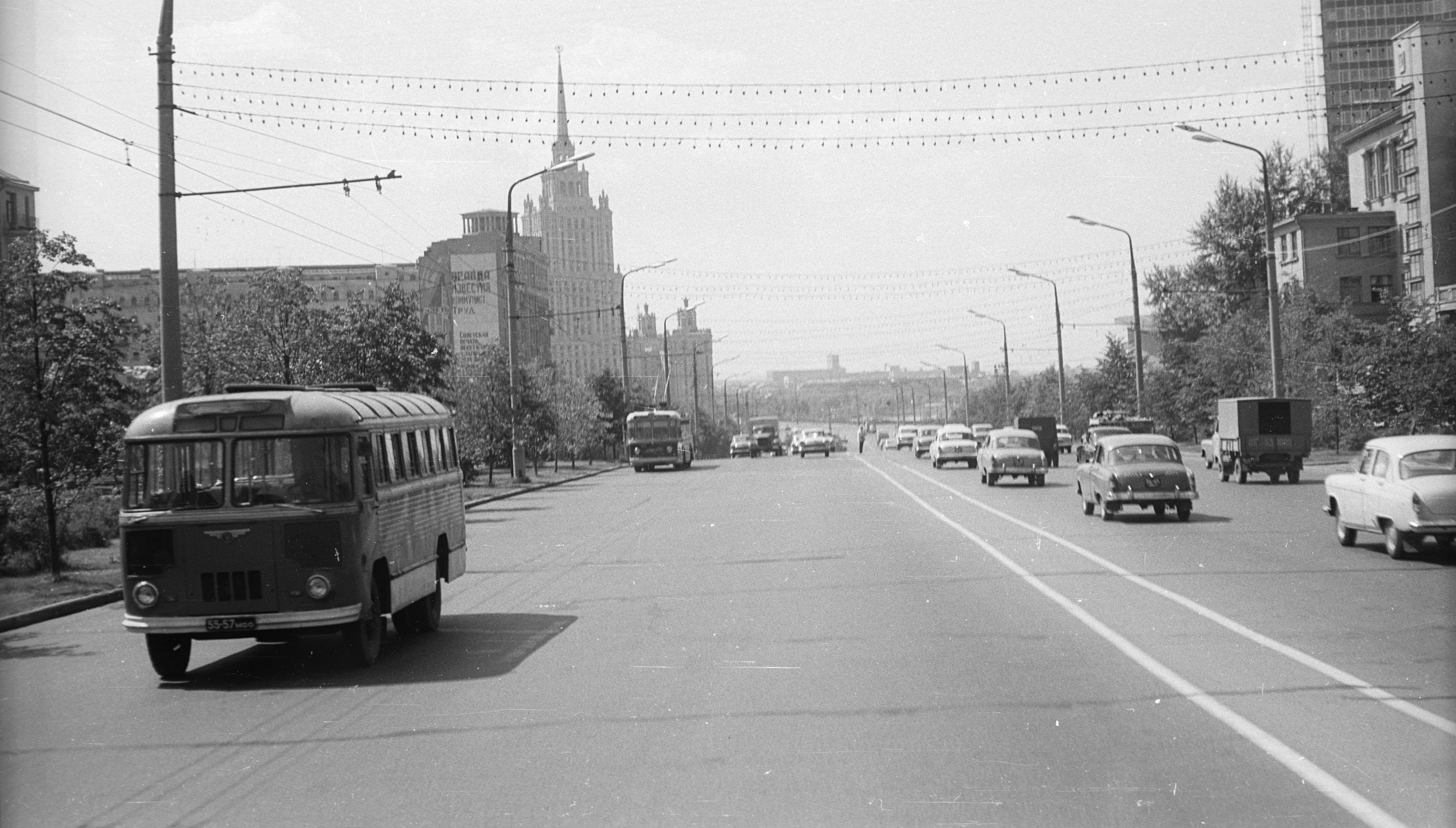 a Novij Arbat a Kutuzov híd felé nézve, szemben az Ukrajna Szálló. Location: Russia, Moscow Tags: bus, street view, traffic, trolley bus, commercial vehicle, lamp post, Soviet Union Title: a Novij Arbat a Kutuzov híd felé nézve, szemben az Ukrajna Szálló.